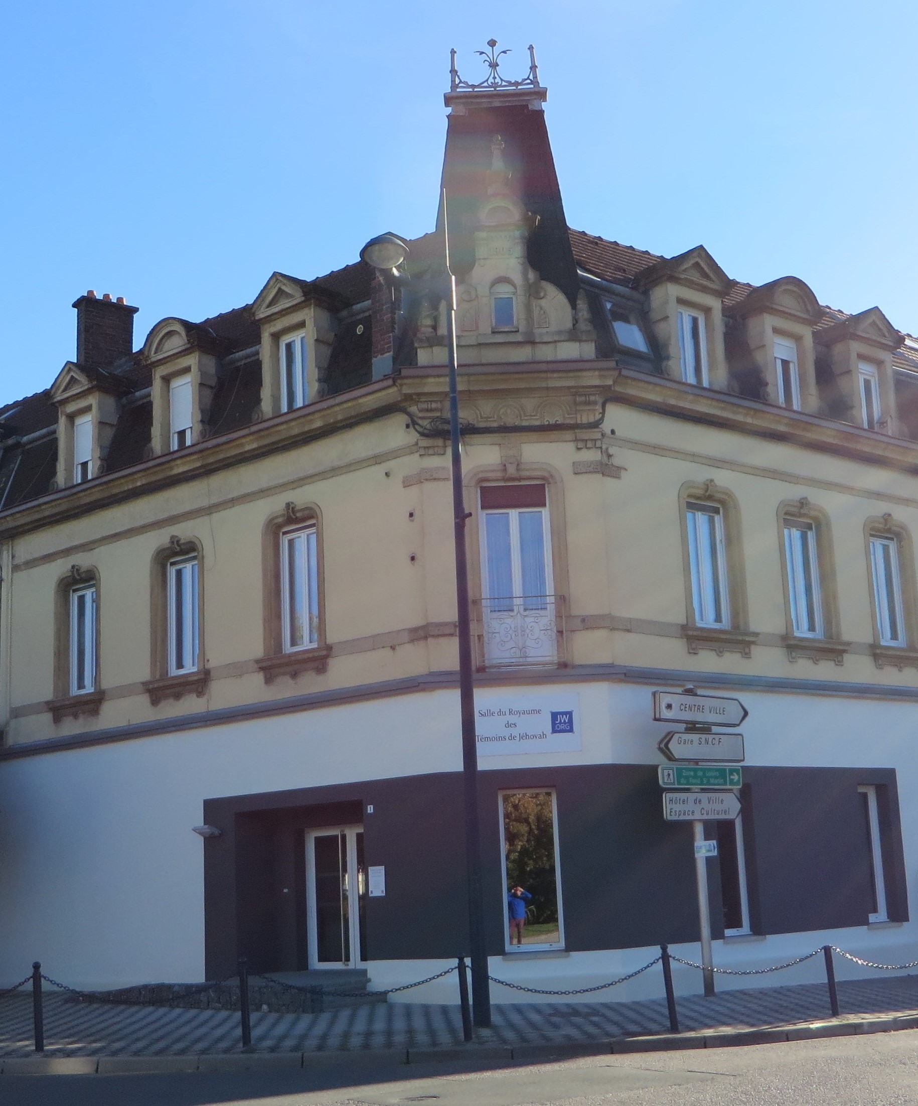 Rombas Salle du Royaume